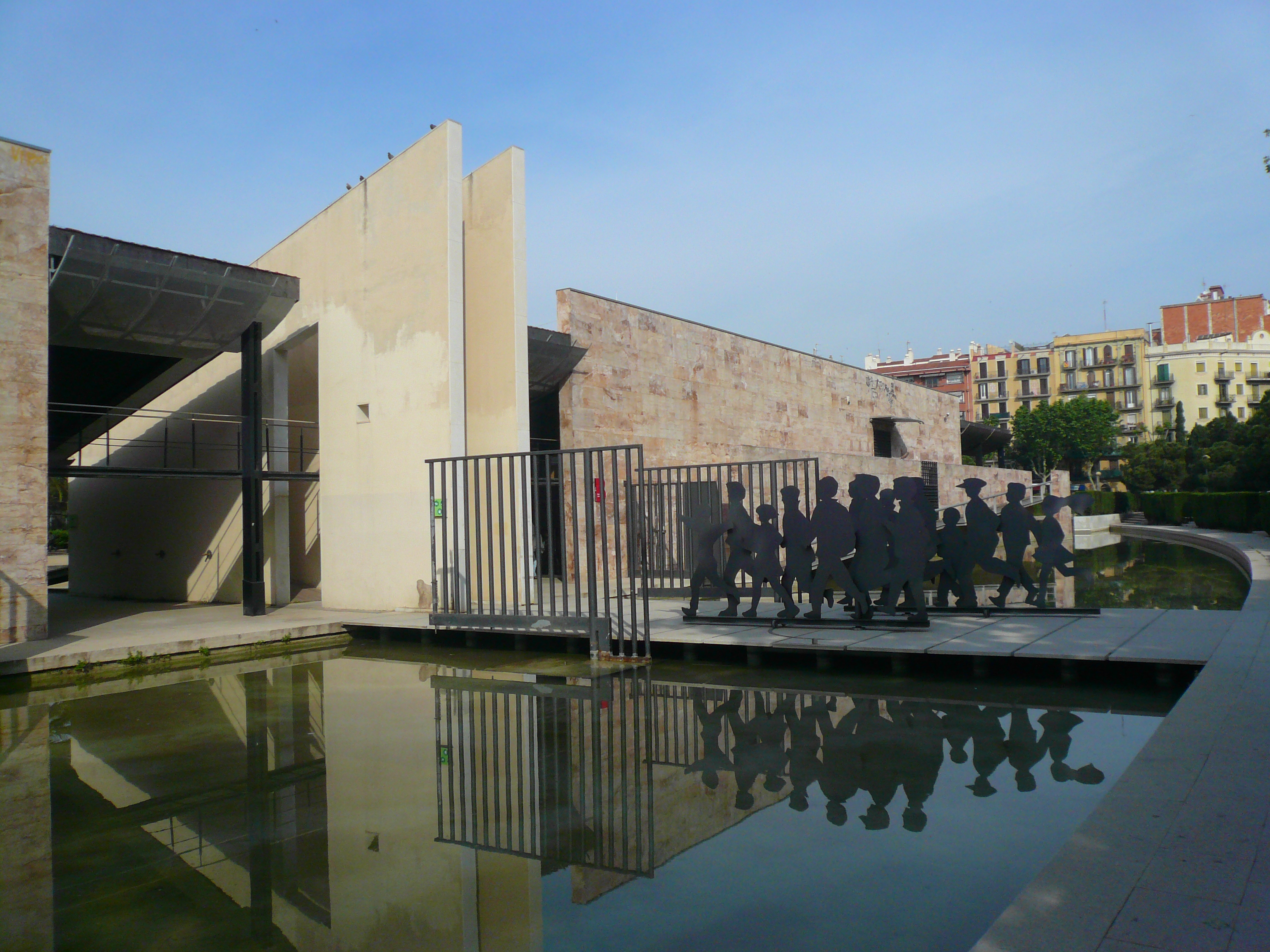 Escolars. Parc de Joan Miró, Biblioteca Joan Miró (Barcelona). Disseny: Màrius Quintana, Beth Galí, Antoni Solanas, Andreu Arriola. Material: acer pintat negre. 1990. 43″ N, 2° 08′ 57.19″ E